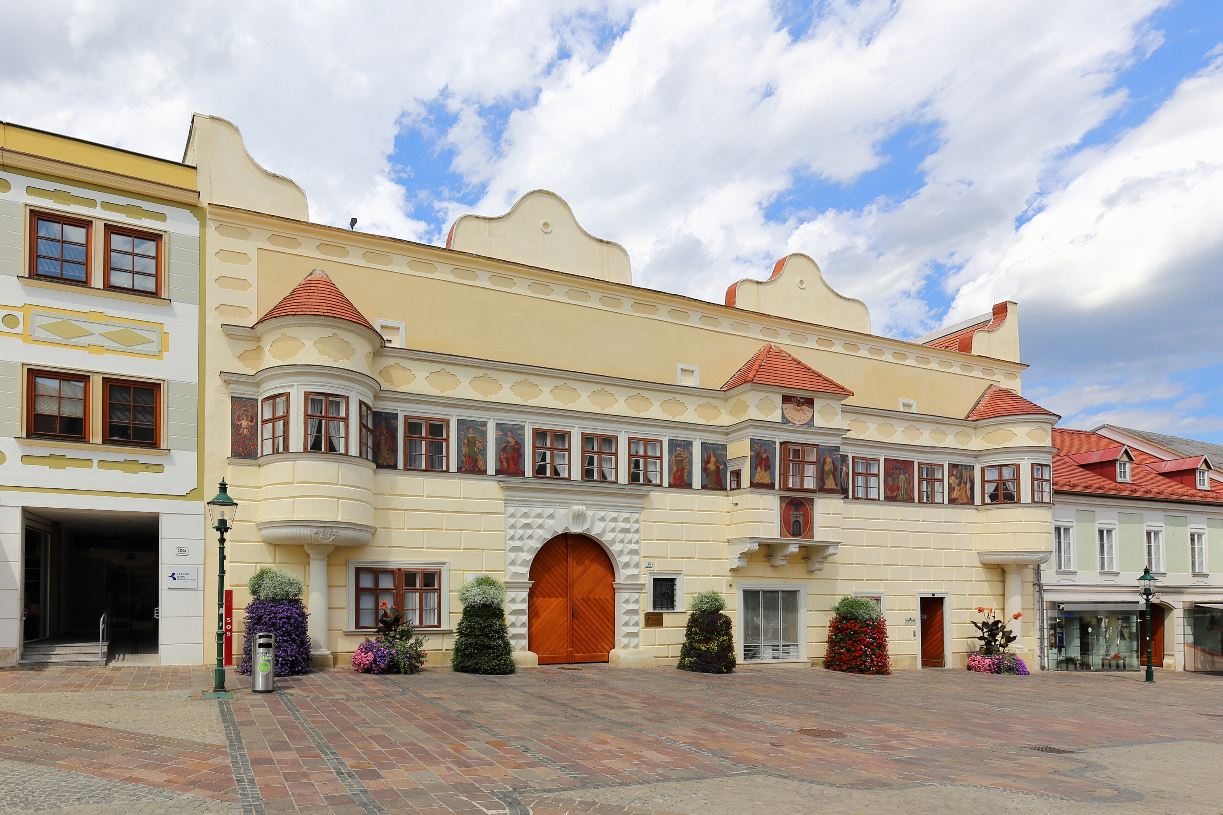 Rathaus der burgenländischen Landeshauptstadt Eisenstadt.Der zweigeschossige barocke Bau ist im Kern um 1560. Zur Zeit der Freistadterhebung wurde er um 1648 umgebaut und 1747 renoviert. Die 1926 in der Fensterzone entdecken Wandmalereien malte Rudolf Holzinger getreu den alten Mustern neu und ergänzte die fehlenden Bilder.